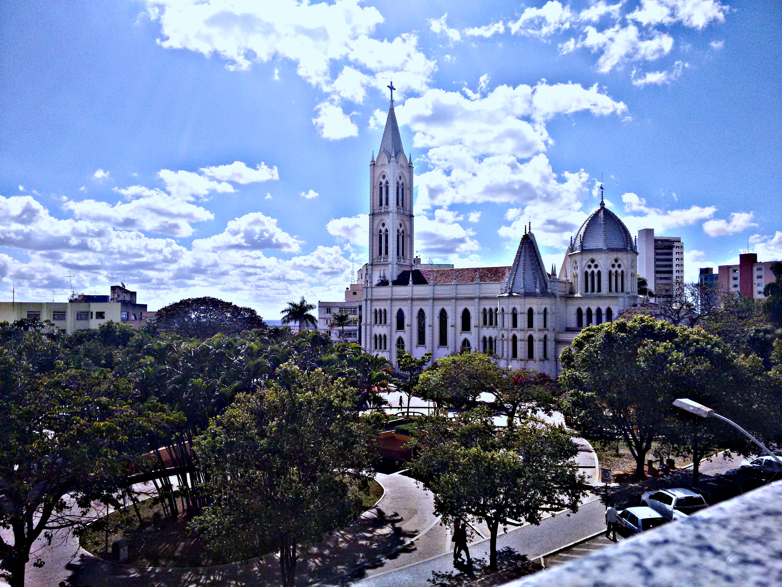 Igreja Da Matriz,em Bom Despacho,Vista Laterak